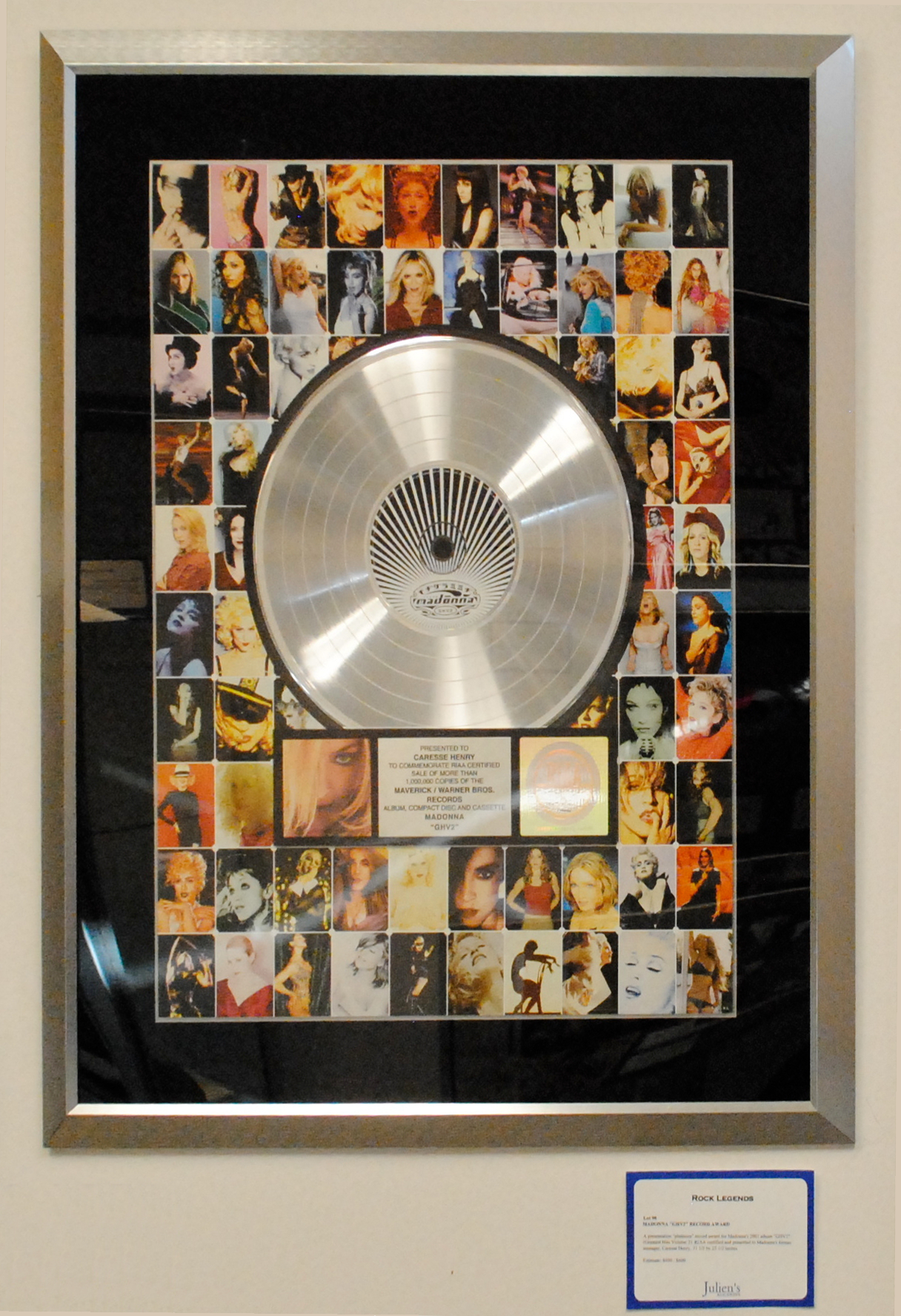 Disco de platino concedido a Madona